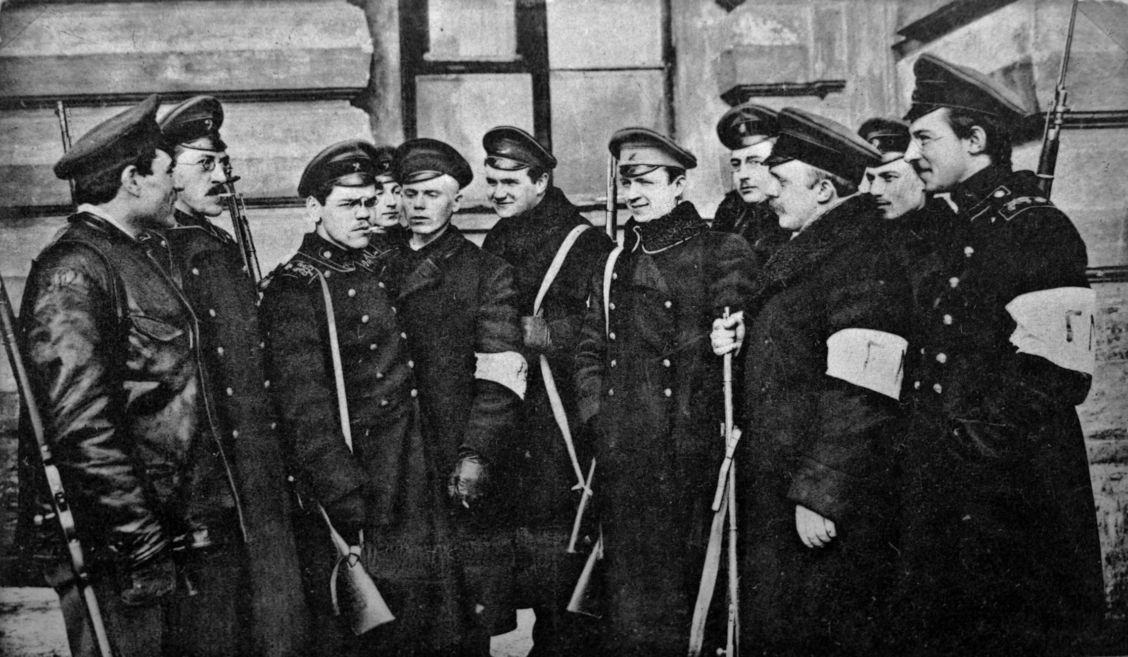 Студенты-милиционеры после февральской революции